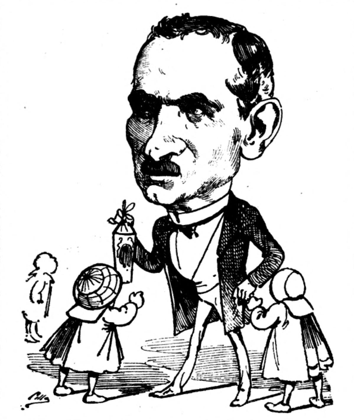 Mariano Benavente.